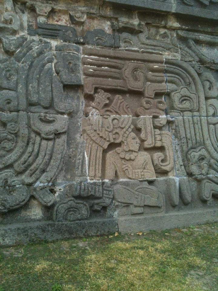 Hombre Maya en el Templo de la Serpiente Emplumada en el sitio arqueológico de Xoxhicalco, Morelos.